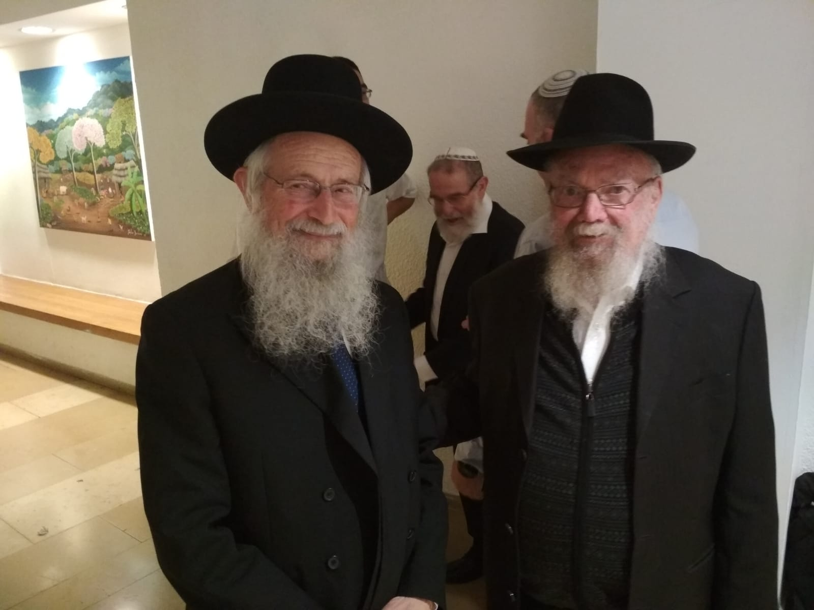 הרב זלמן מלמד עם הרב יעקב פילבר. חשוון תשעט